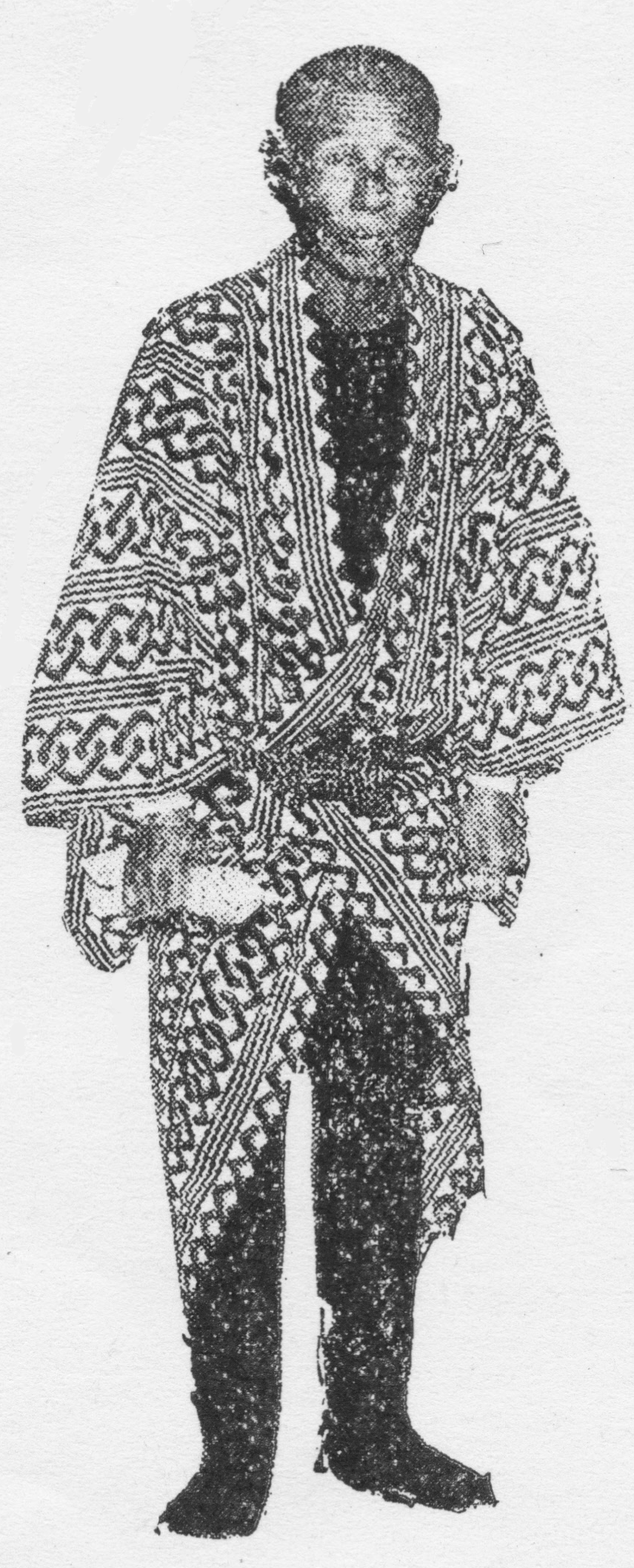 豊年斎梅坊主(1854-1927)。かっぽれで有名だが、あほだら経なども演じ、音源が残る。